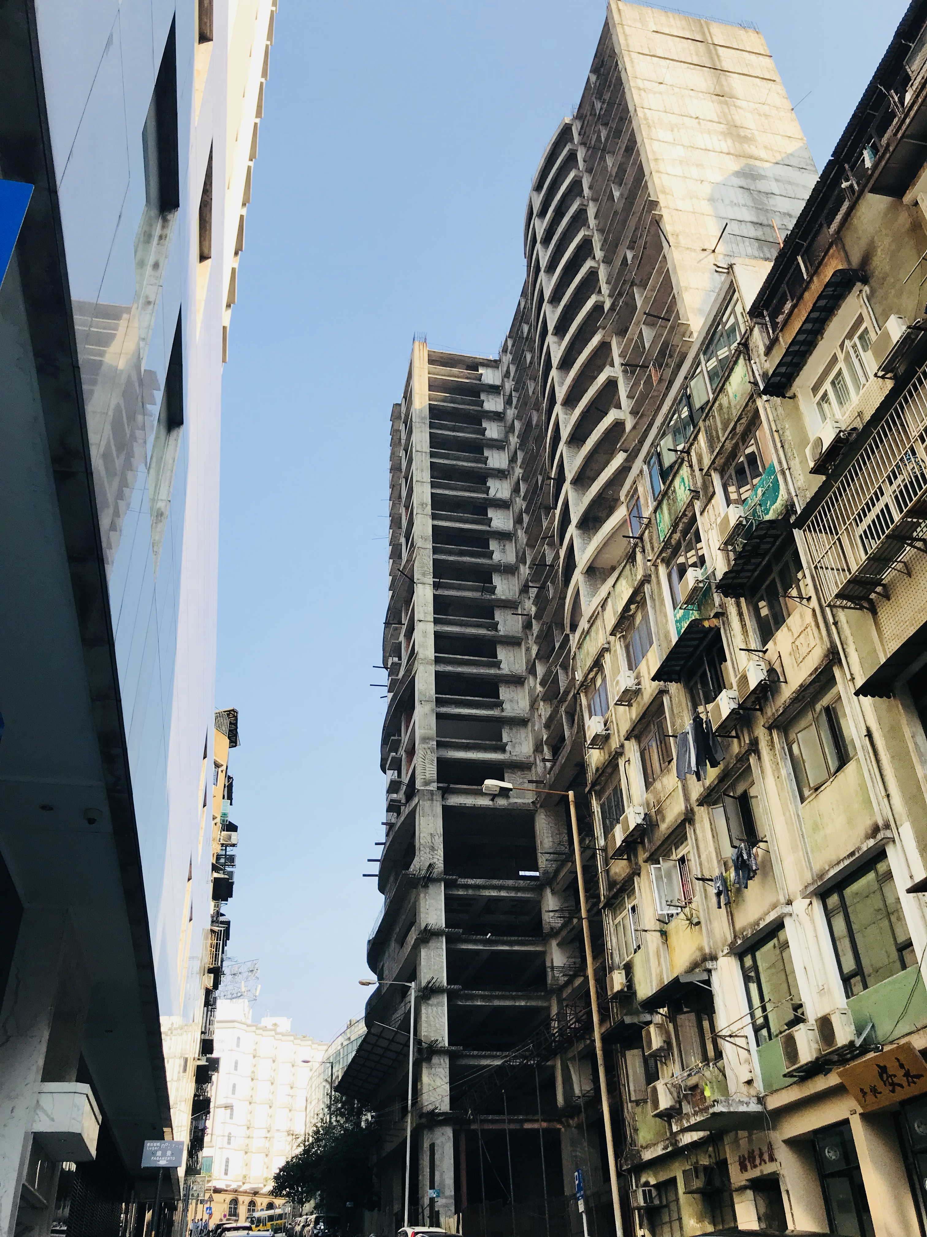 中文（台灣）: 東望洋斜巷爛尾樓。